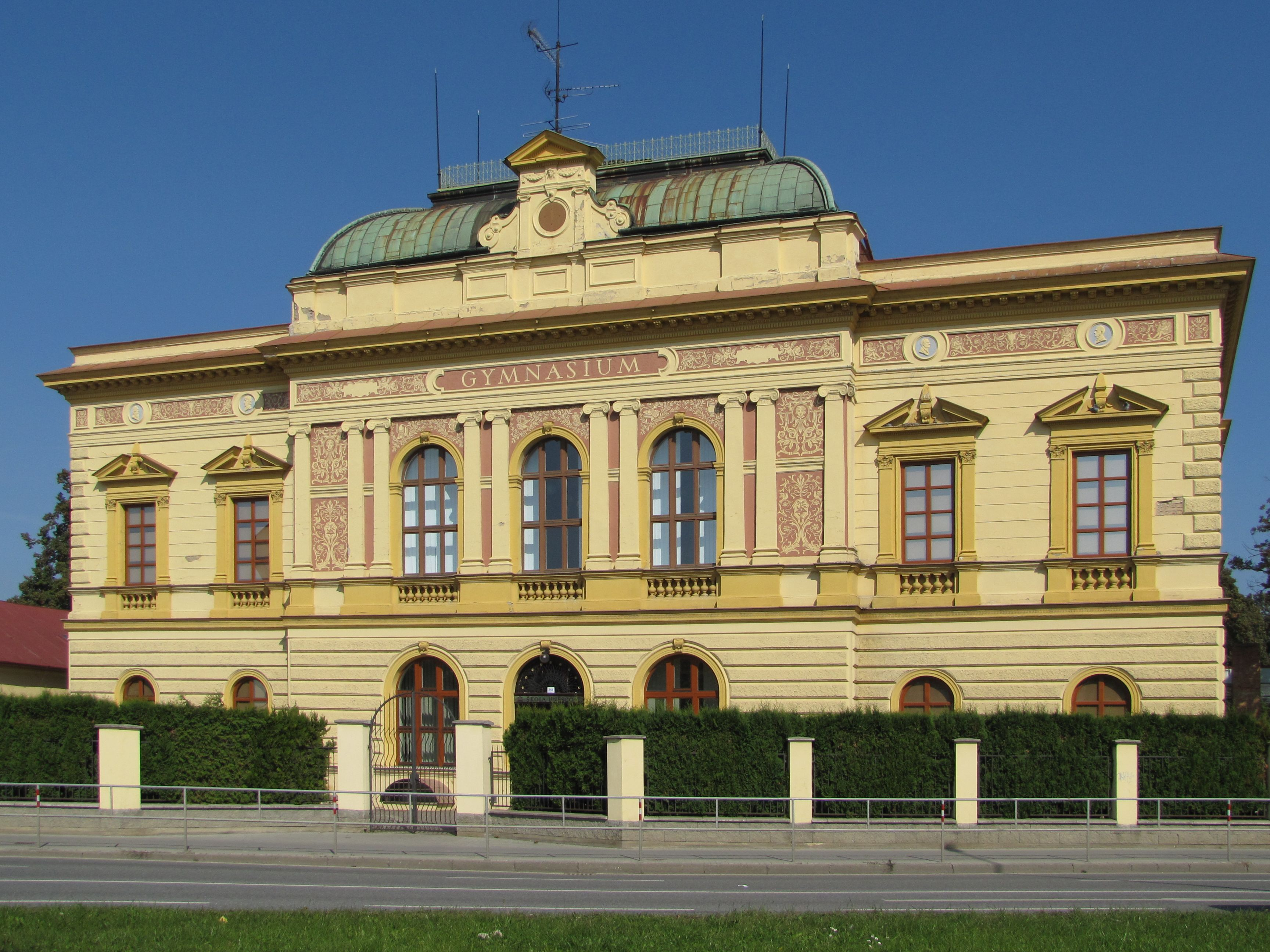 Budova gymnázia v Uherském Hradišti, Česká republika. Neorenesanční stavba z roku 1885 od architekta Josefa Schaniaka.